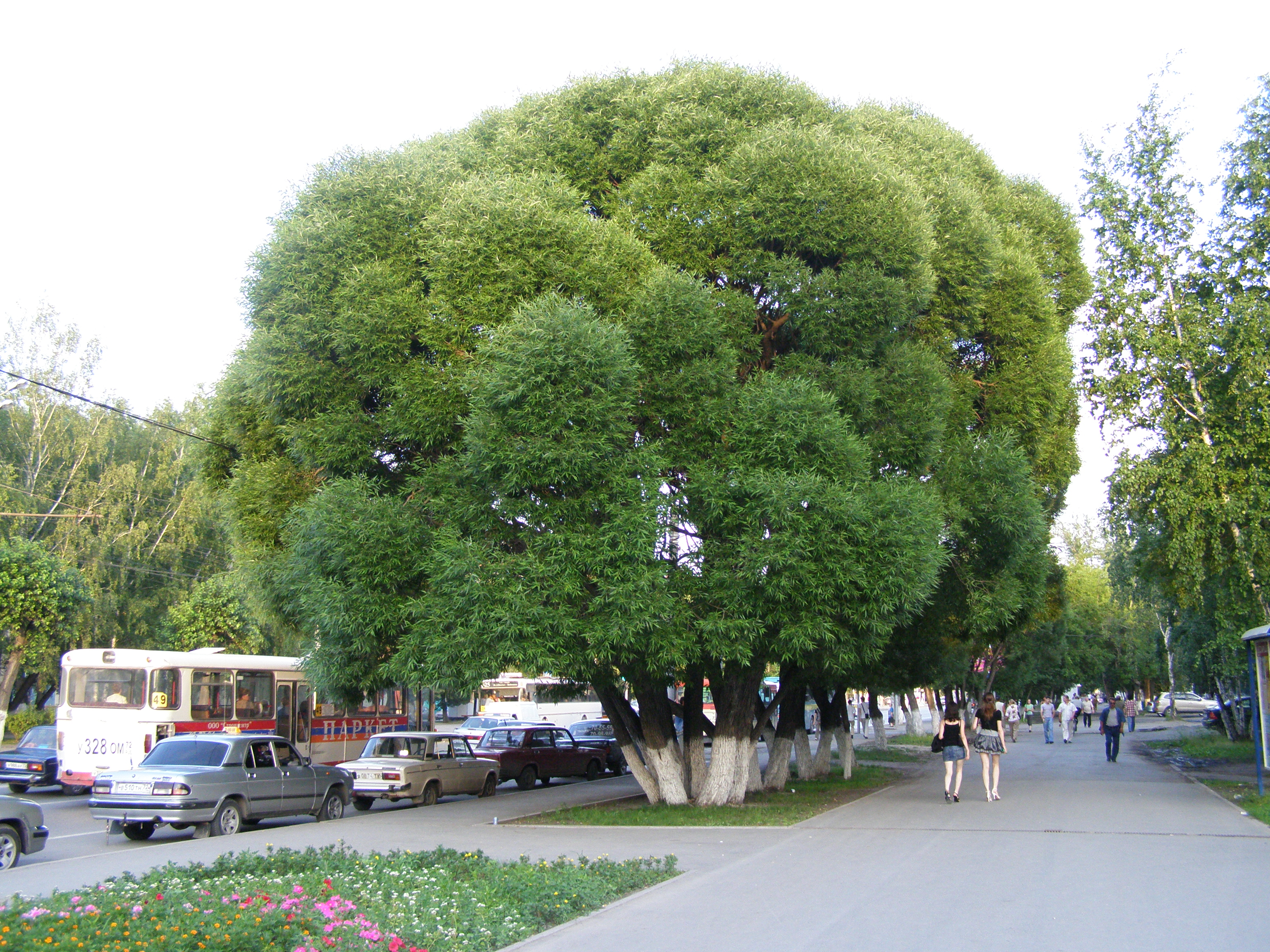 Strato Respubliki. Tjumeno, Rusio.